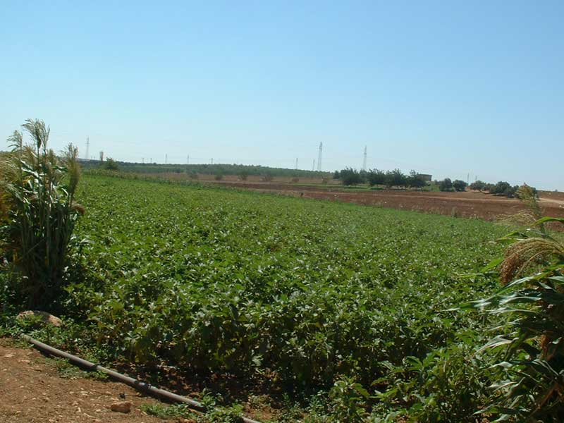 صورة من قرية مسكنة في حمص